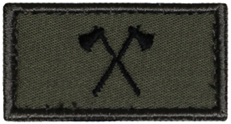 Pionier